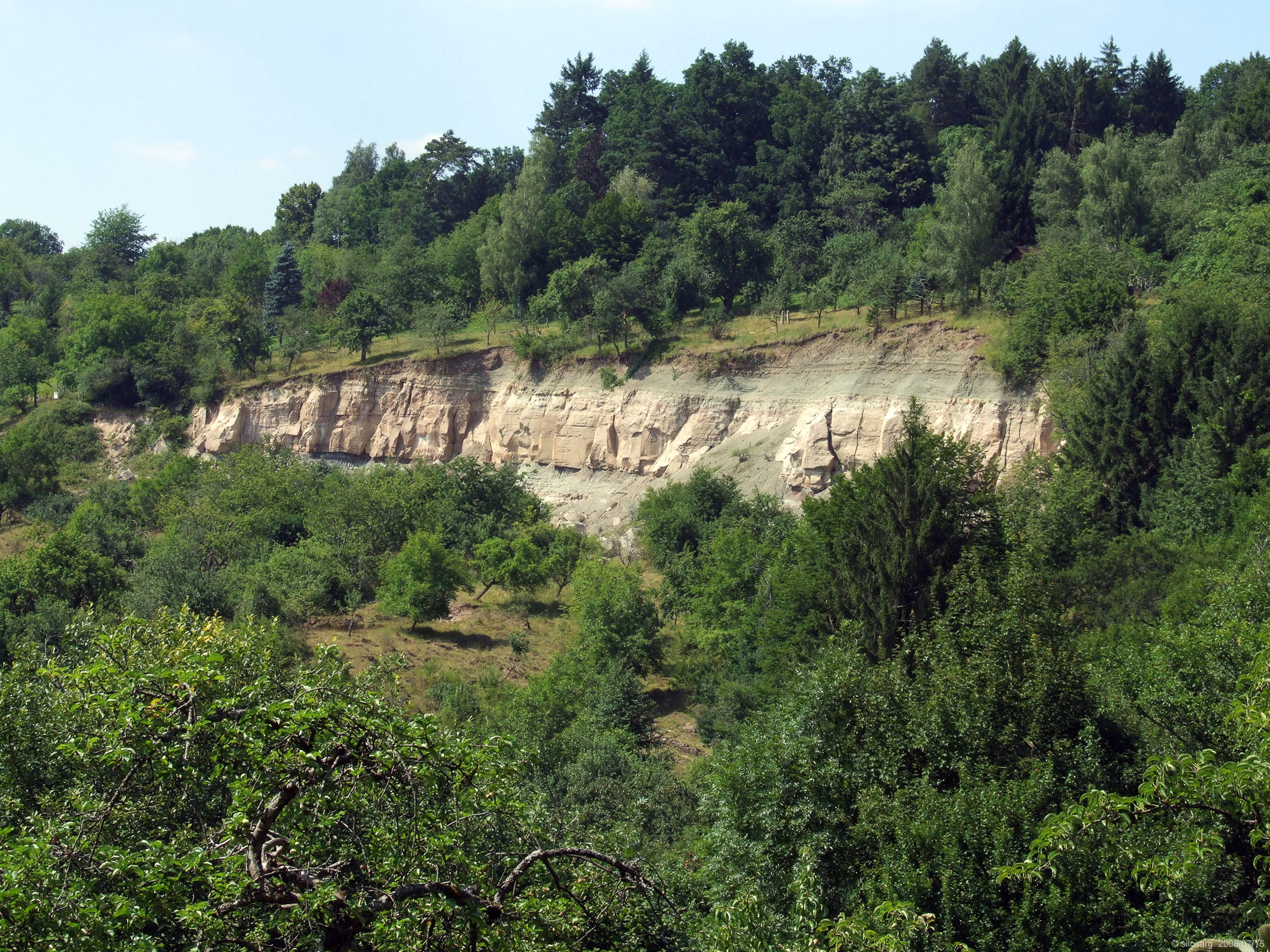 Bergrutsch vom 07.04.2001 bei Urbach, aufgenommen am 15.07.2008.